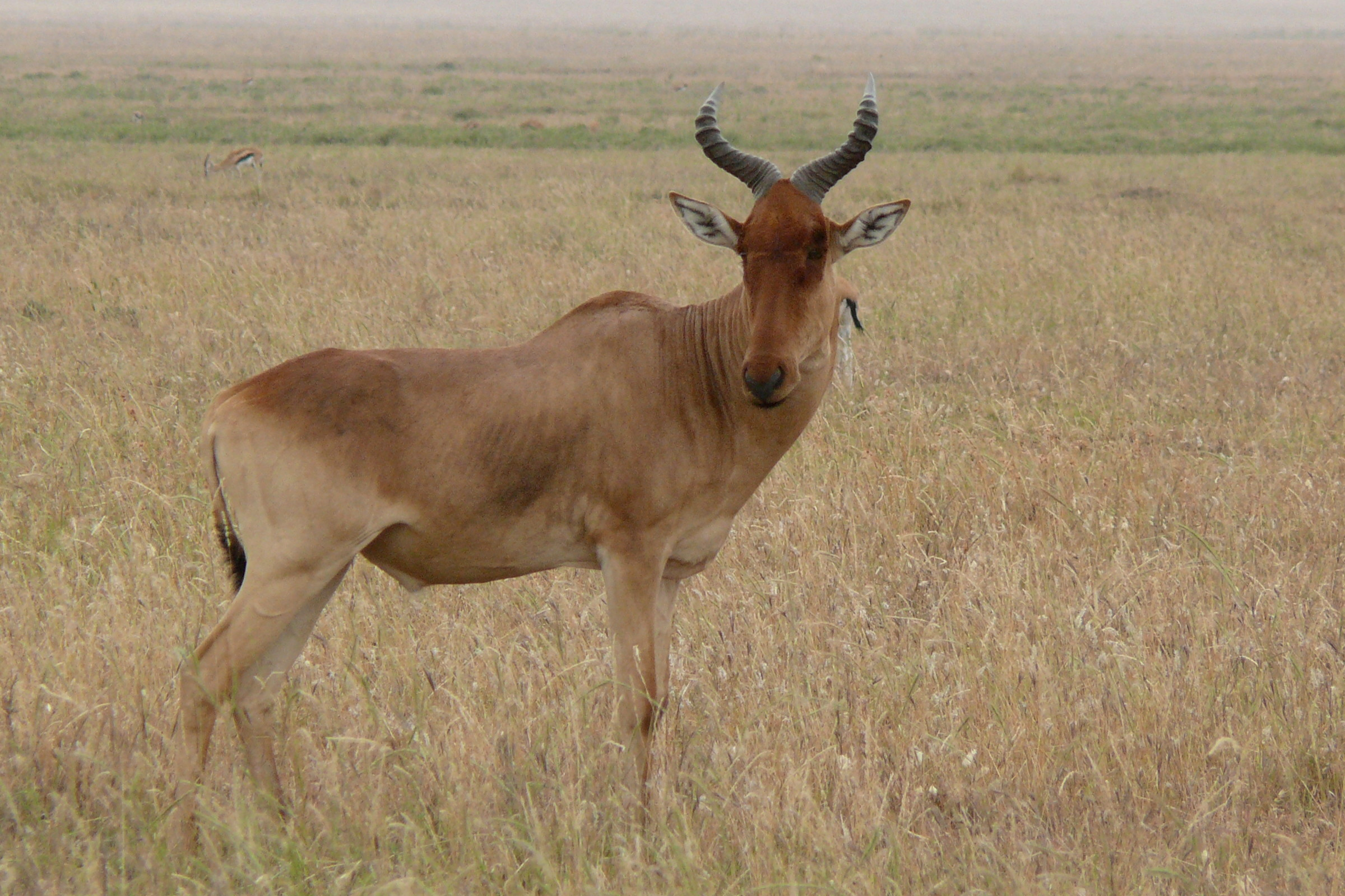 Kongoni (Alcelaphus buselaphus cokii)